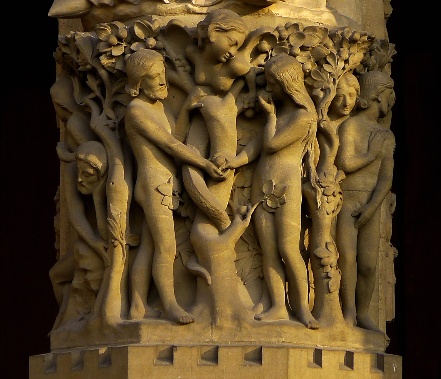 Cathédrale Notre-Dame de Paris (sculpture façade ouest : Adam et Eve au paradis)